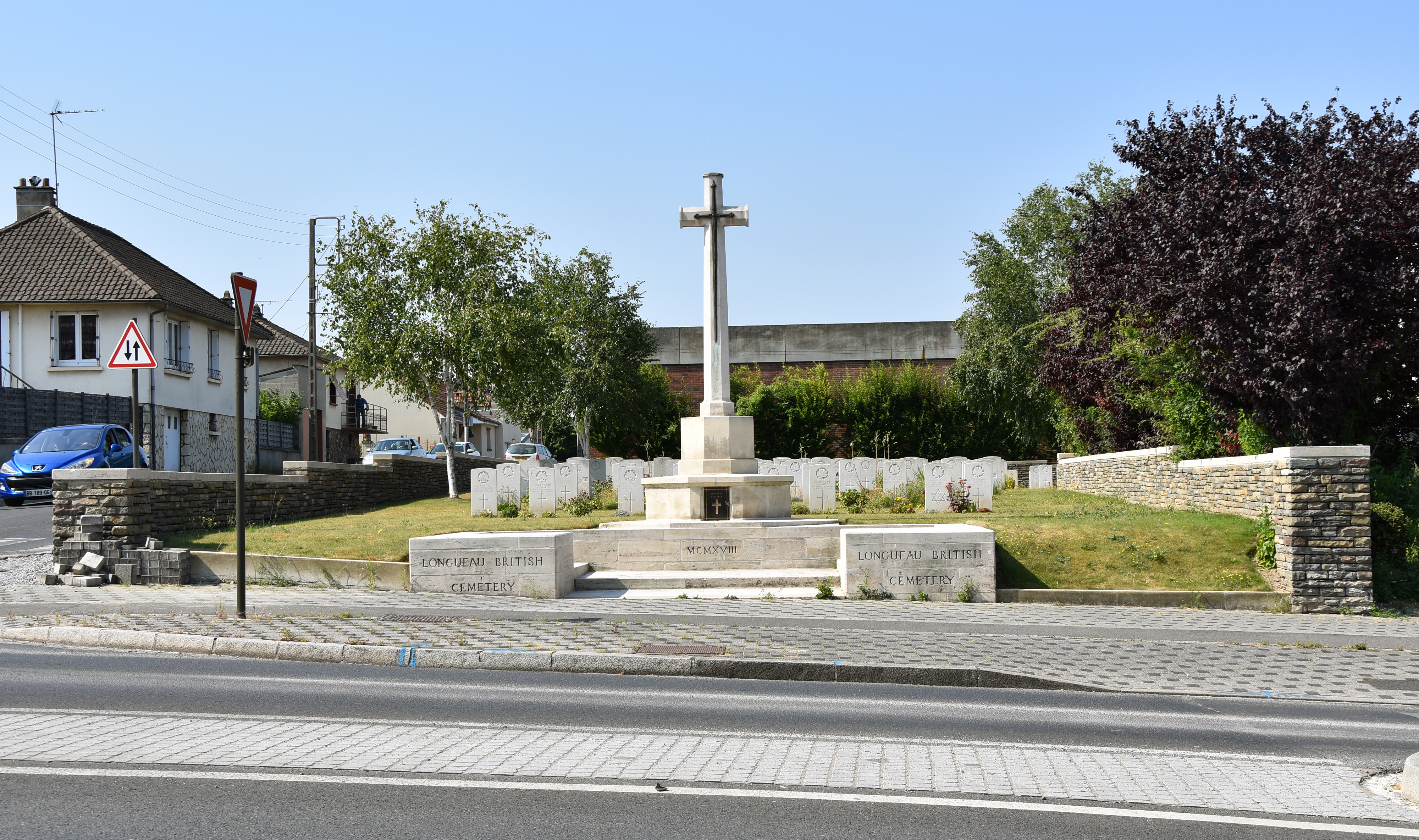 La croix du Longueau British Cemetery